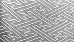 CG